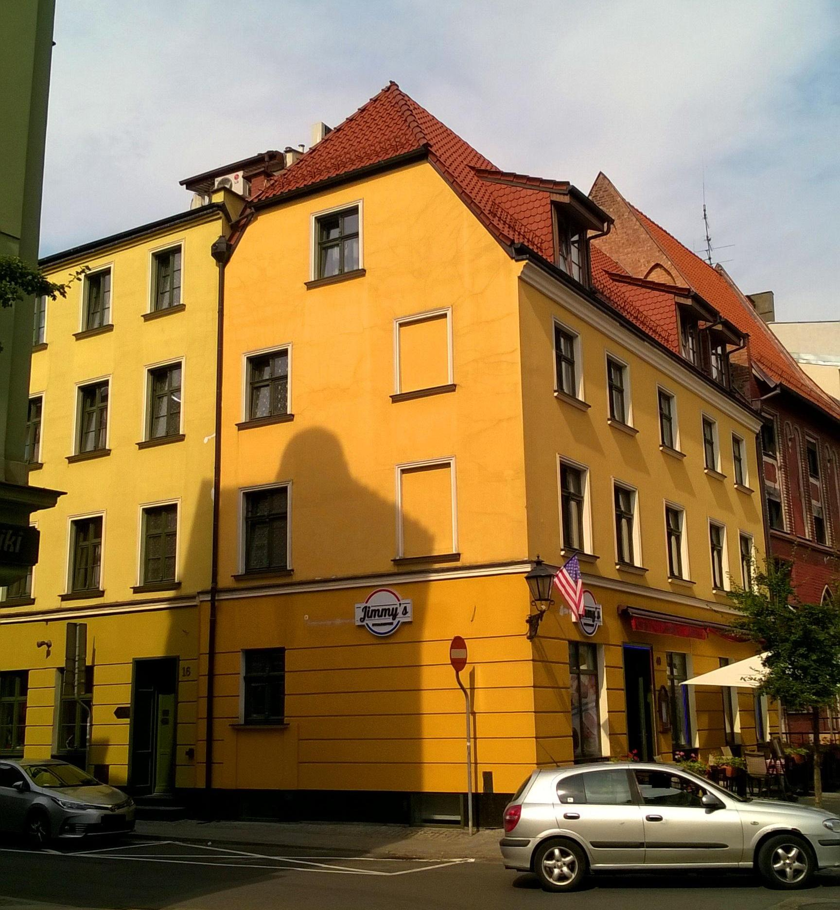 Hotel Gotyk w Toruniu